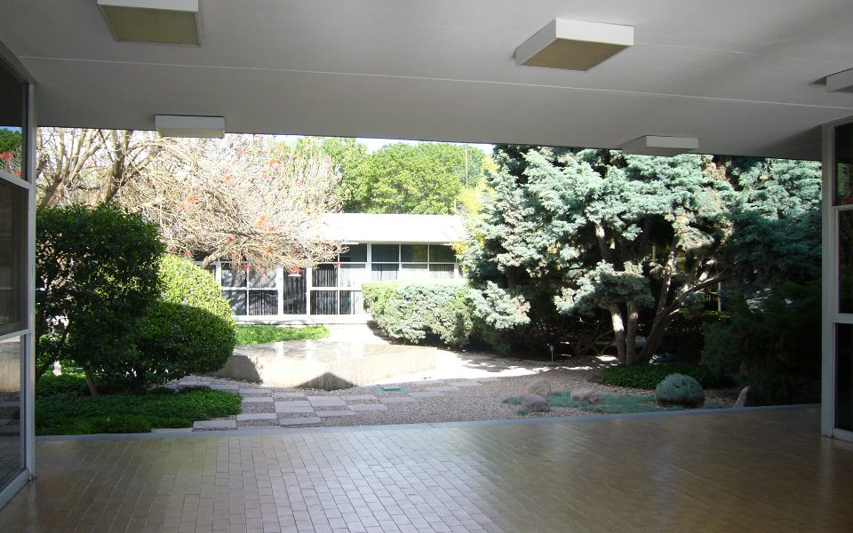 Jardín de Rectoría de la Universidad Autónoma de Aguascalientes